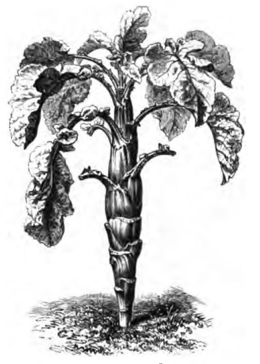 Les plantes potagères. Description et culture des principaux légumes des climats tempérés, 1re édition, ouvrage publié par la maison Vilmorin-Andrieux & Cie à Paris en 1883.